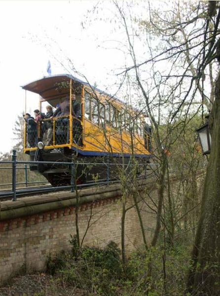 Nerobergbahn bei der Bergfahrt (Wagen 1 kurz nach dem Verlassen der Talstation).